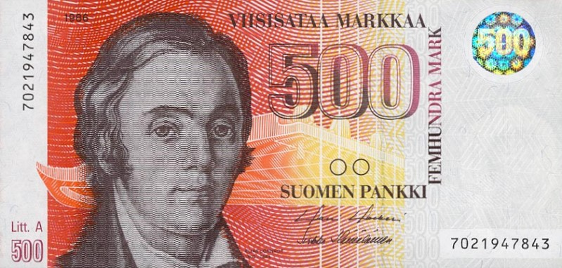 500 markkaa